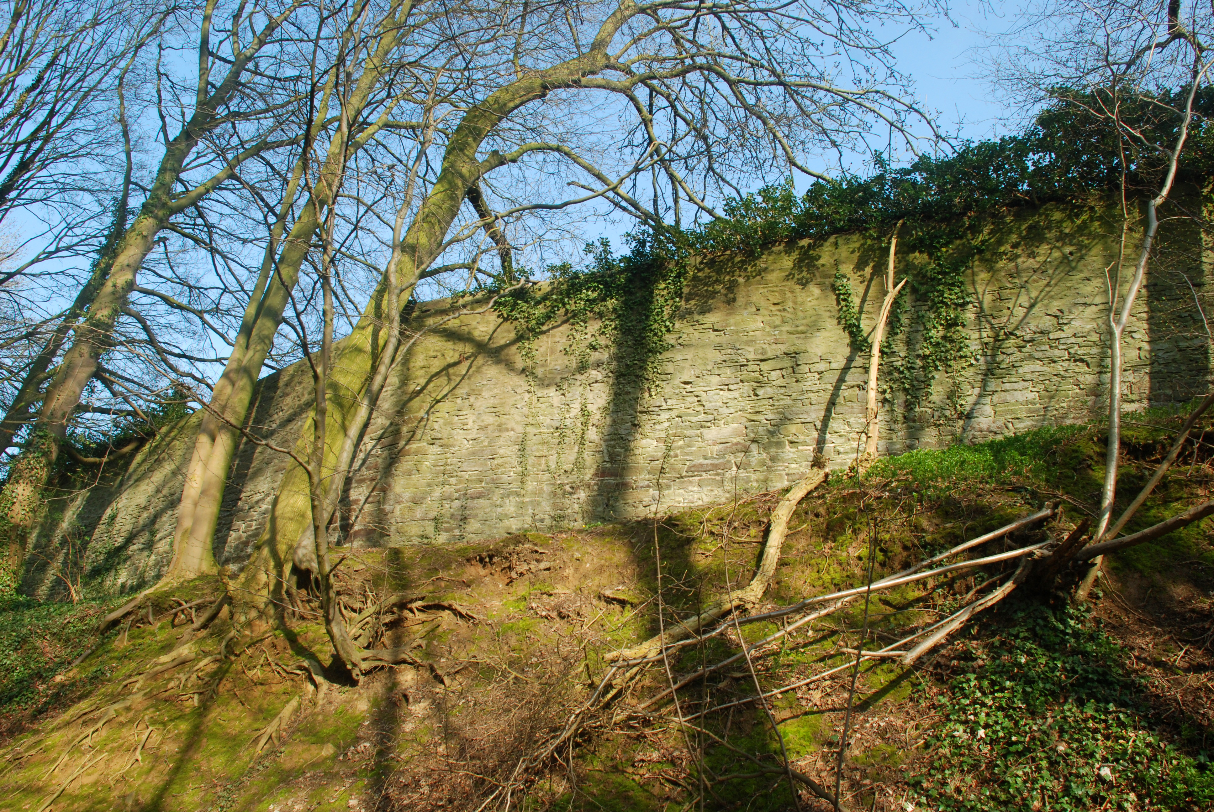 Belgique - Brabant wallon - Mur d'enceinte de l'abbaye de Villers-la-Ville